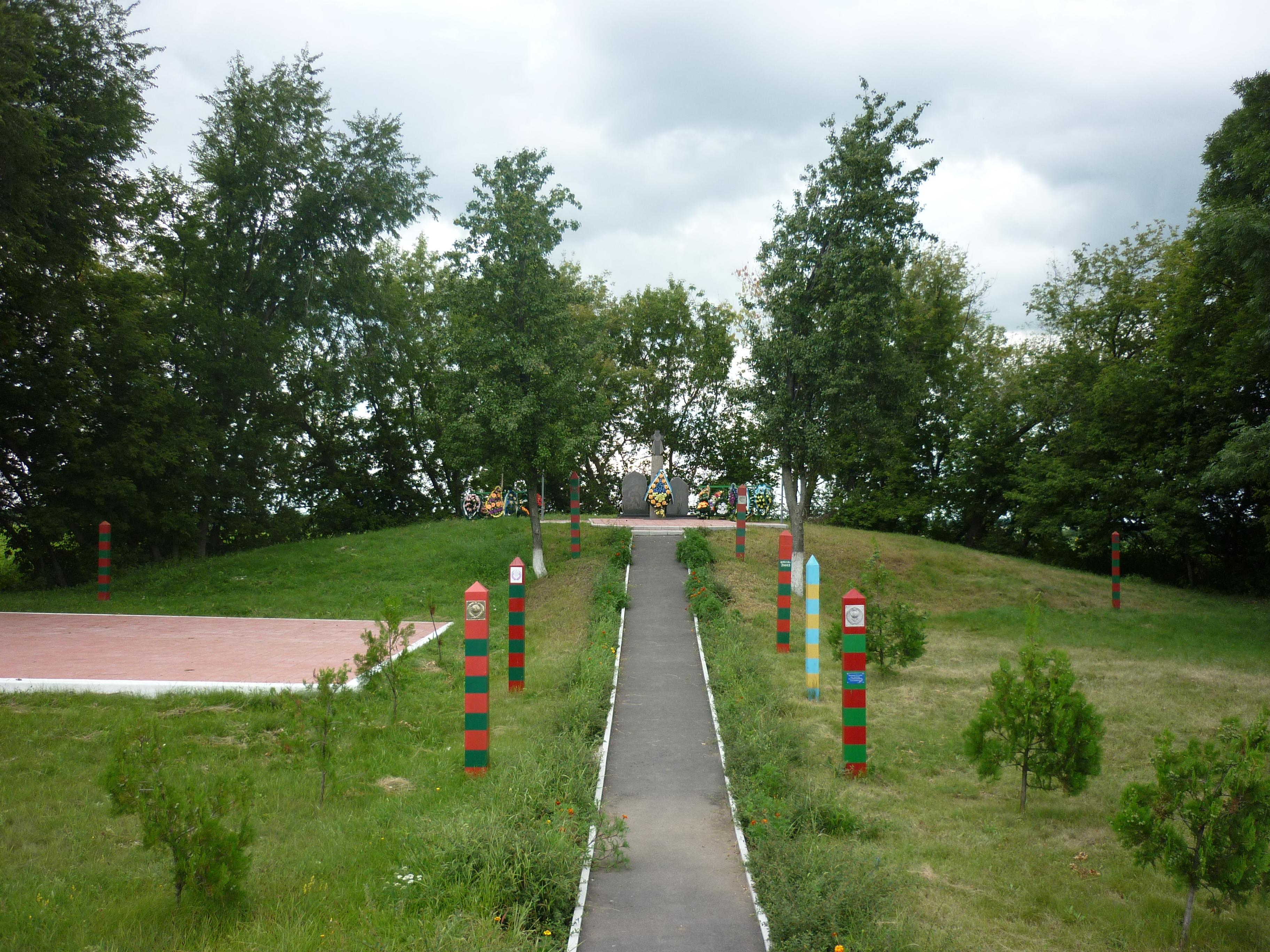 Меморіальний комплекс прикордонникам та їхнім собакам, що загинули в 1941 році